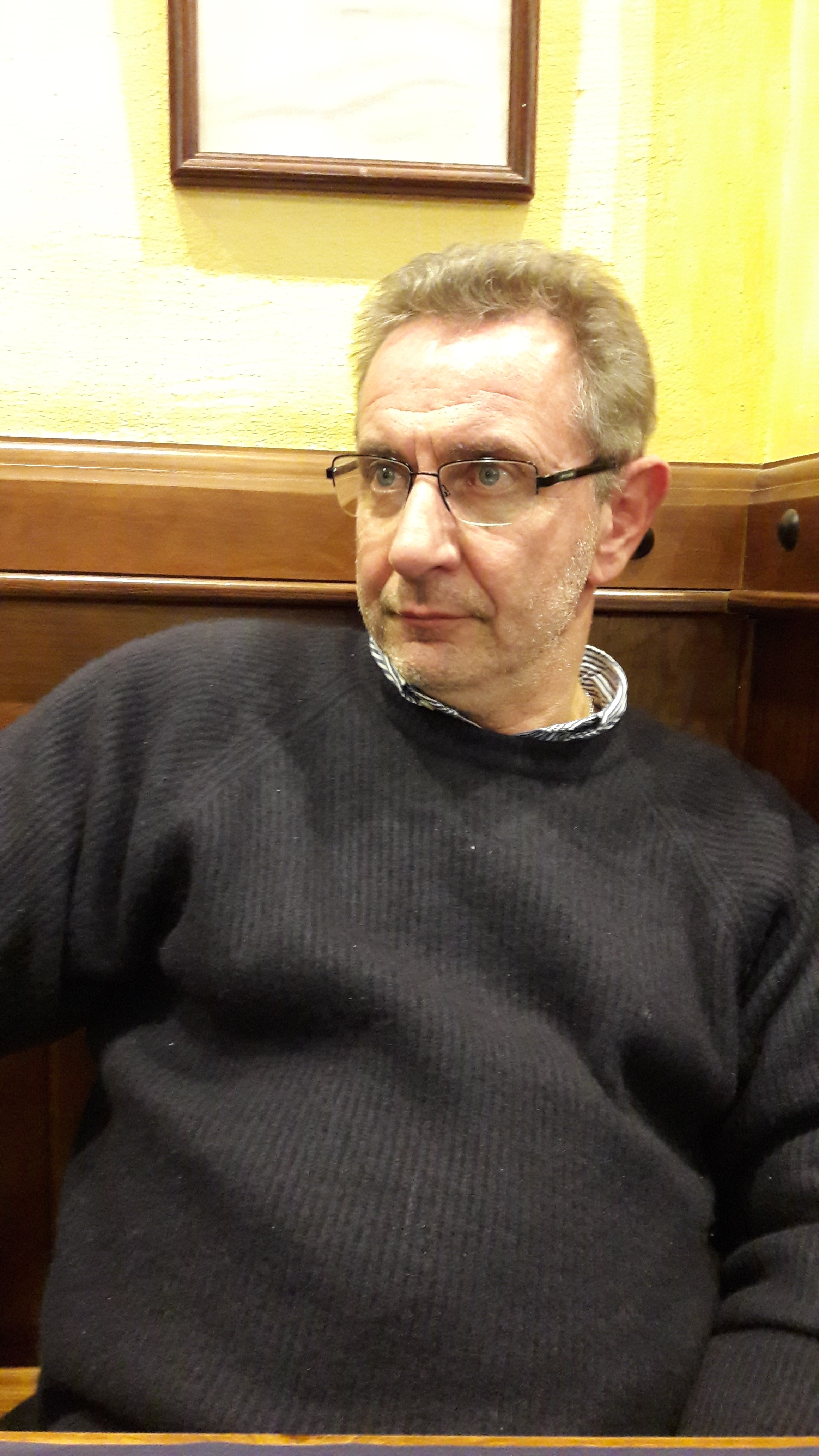 Gandolfo in un momento di relax